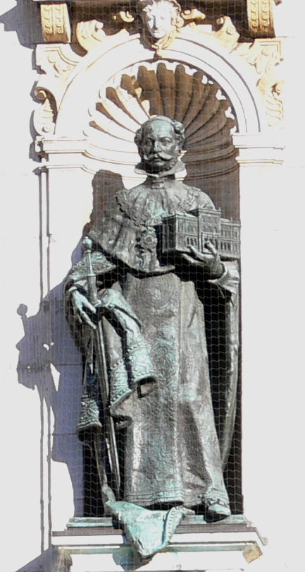 Bayerisches Nationalmuseum, Prinzregentenstraße, MünchenStatue Maximilians II. an der Fassade